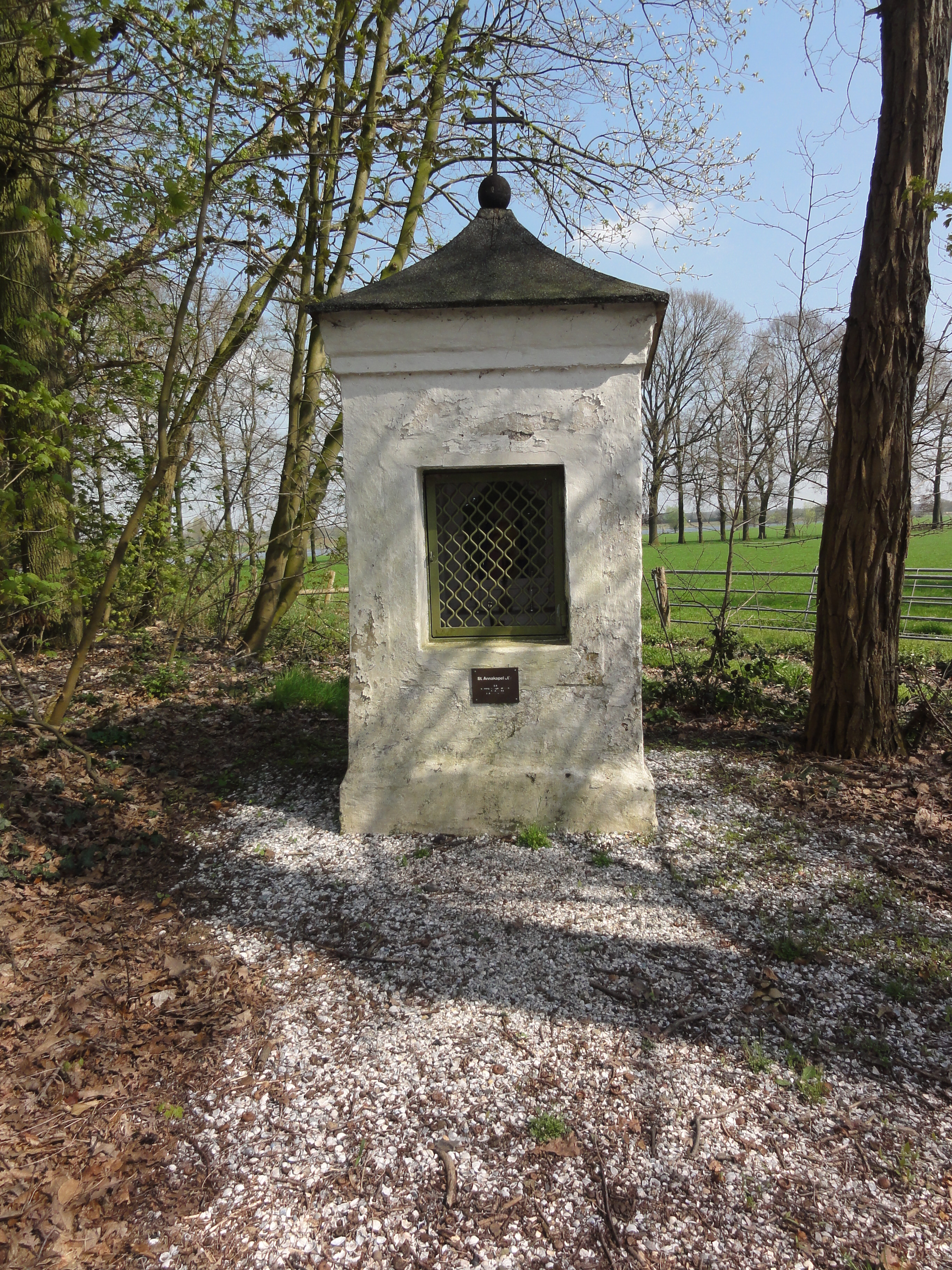 Venray Geijsteren, Annakapelletje, de wegkapel.JPG